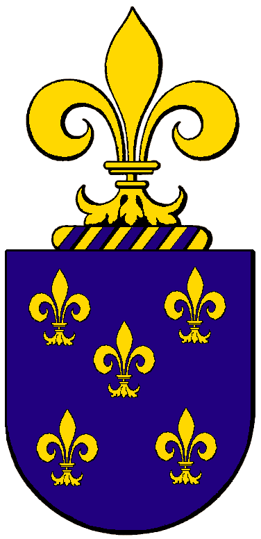 Brasão da Família Guedes